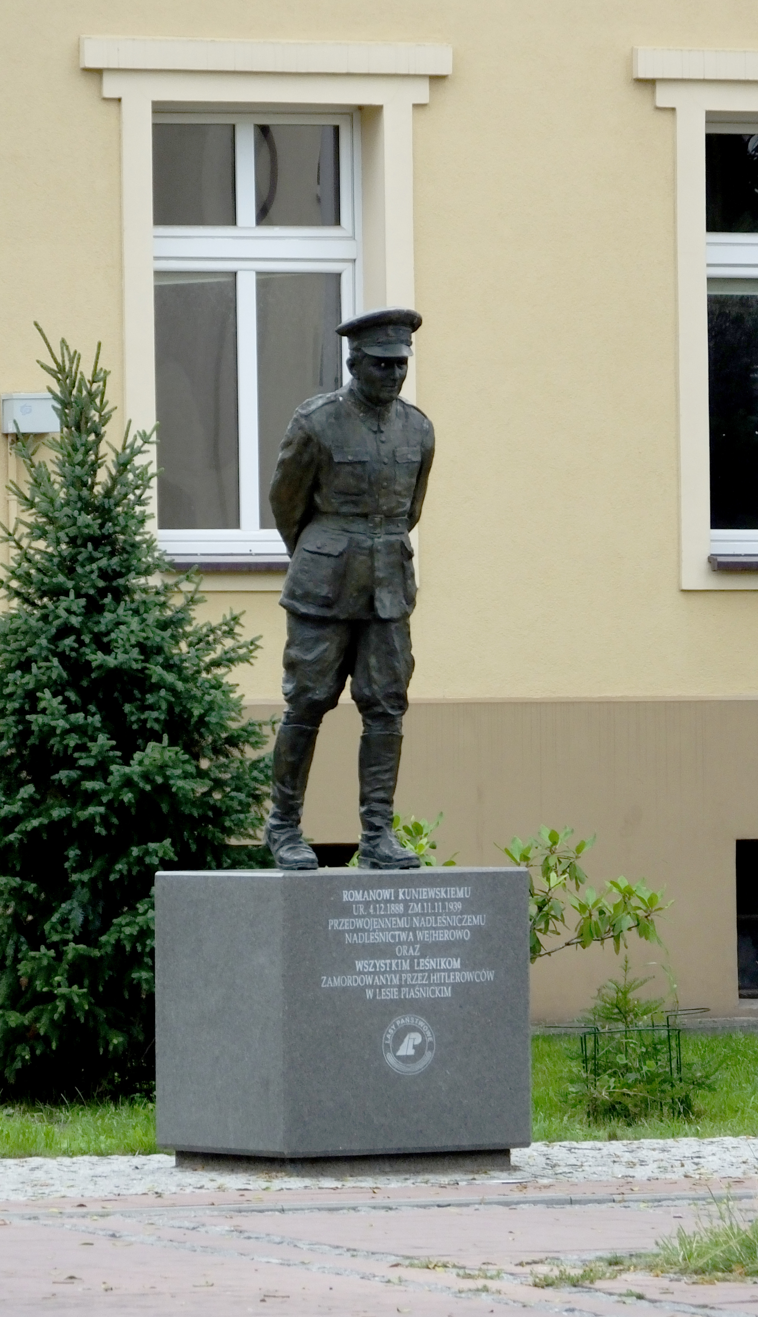 Nadleśnictwo Wejherowo, pomnik Romana Kuniewskiego i leśników zamordowanych w lesie piaśnickim